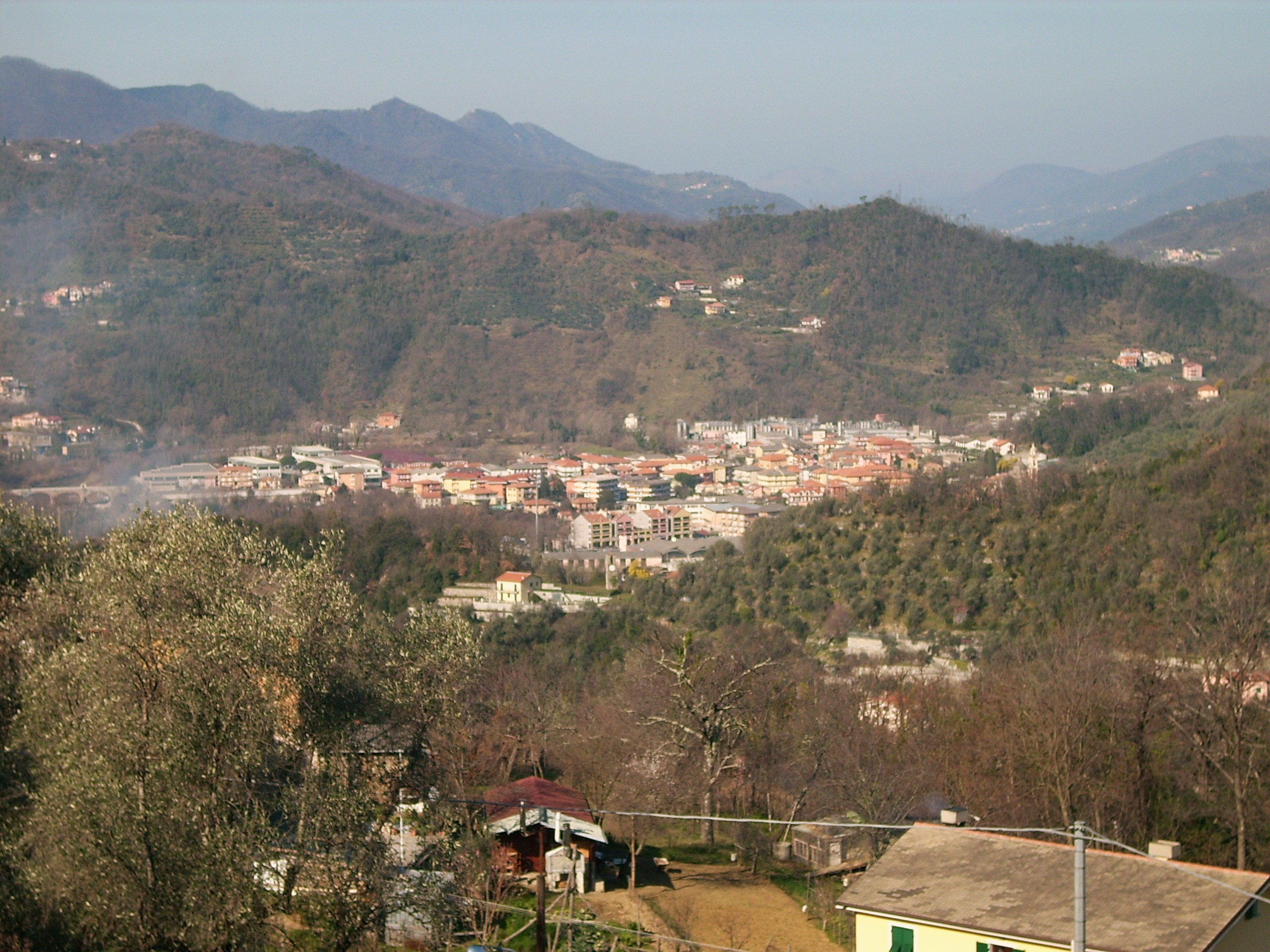 Panorama di Carasco, Liguria, Italy